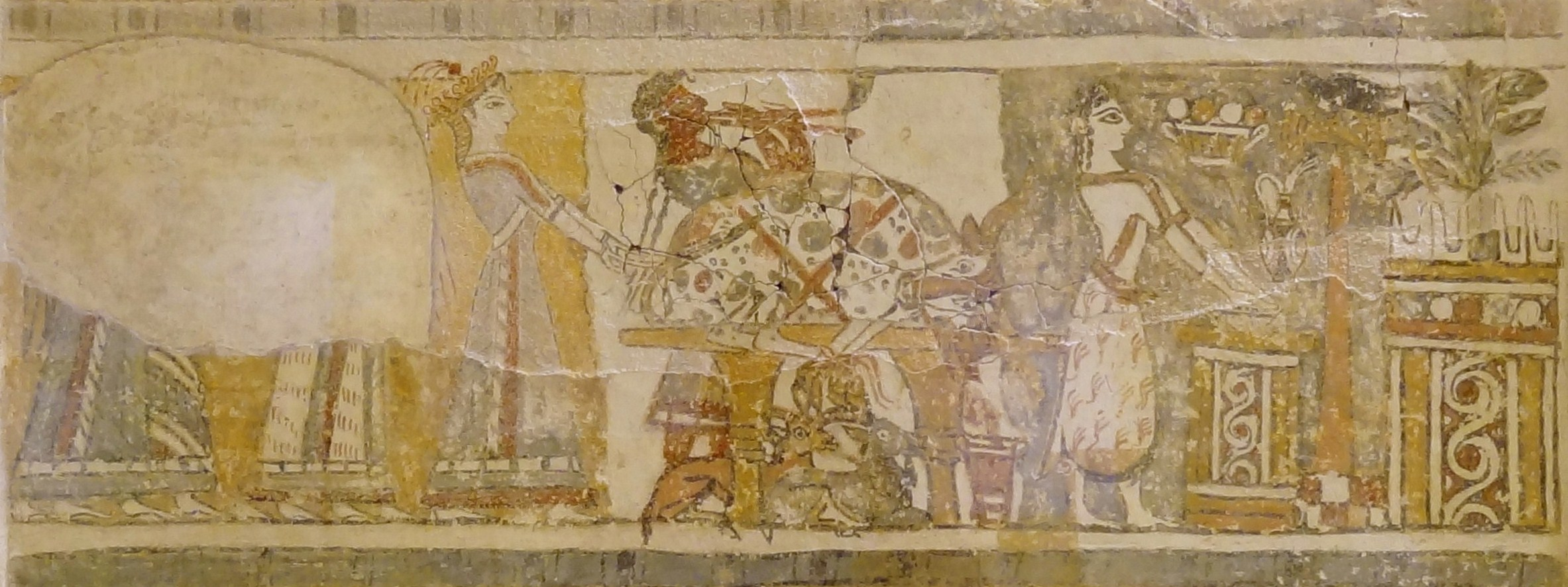 Fresko auf dem Sarkophag von Agia Triada (14. Jahrhundert v. Chr.), ausgestellt im Archäologischen Museum Iraklio, Kreta, Griechenland